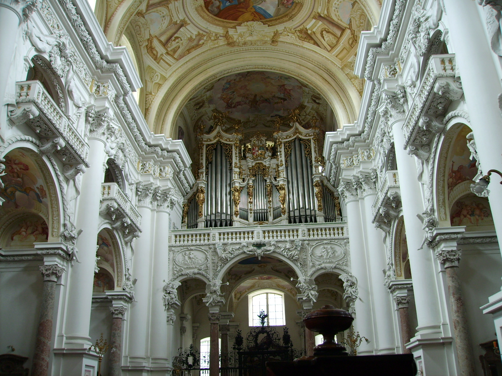 Stift Sankt Florian in der Nähe von Linz. Barockgebäude und Stiftsbasilika der Architekten Carlo Antonio Carlone, Jakob Prandtauer und Gotthard Hayberger, erbaut im Zeitraum von 1686 bis 1750.